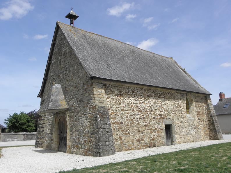 Chapelle Saint-Job à Louvigné-de-Bais.